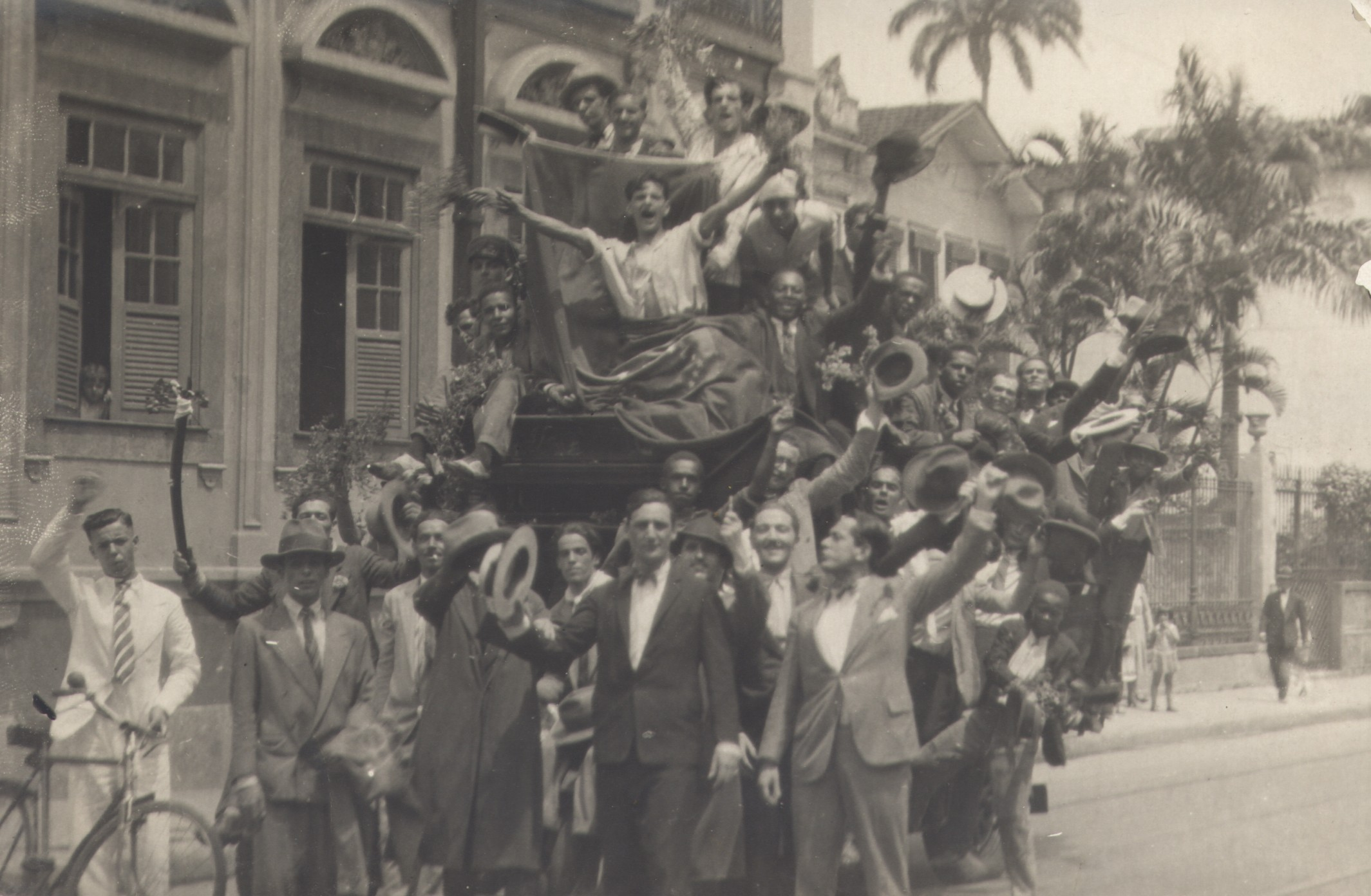 Imagem do Fundo Correio da Manhã.